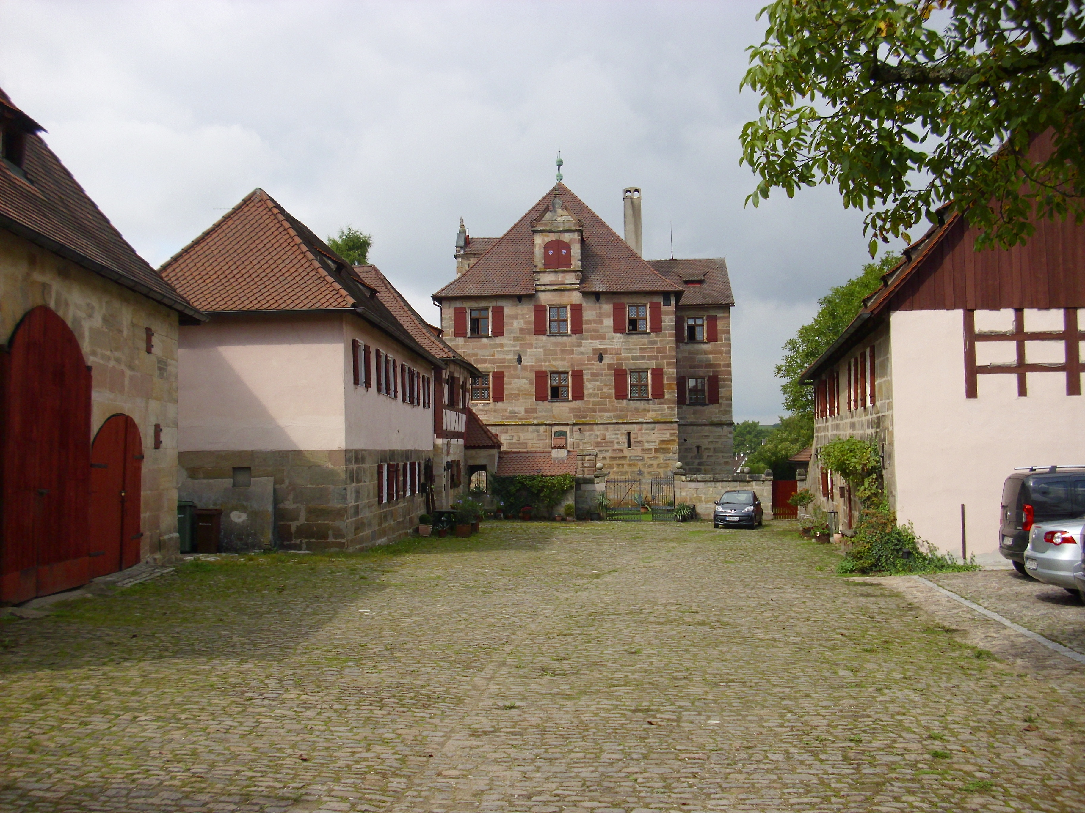 Rotes Schloss Heroldsberg September 2010 02